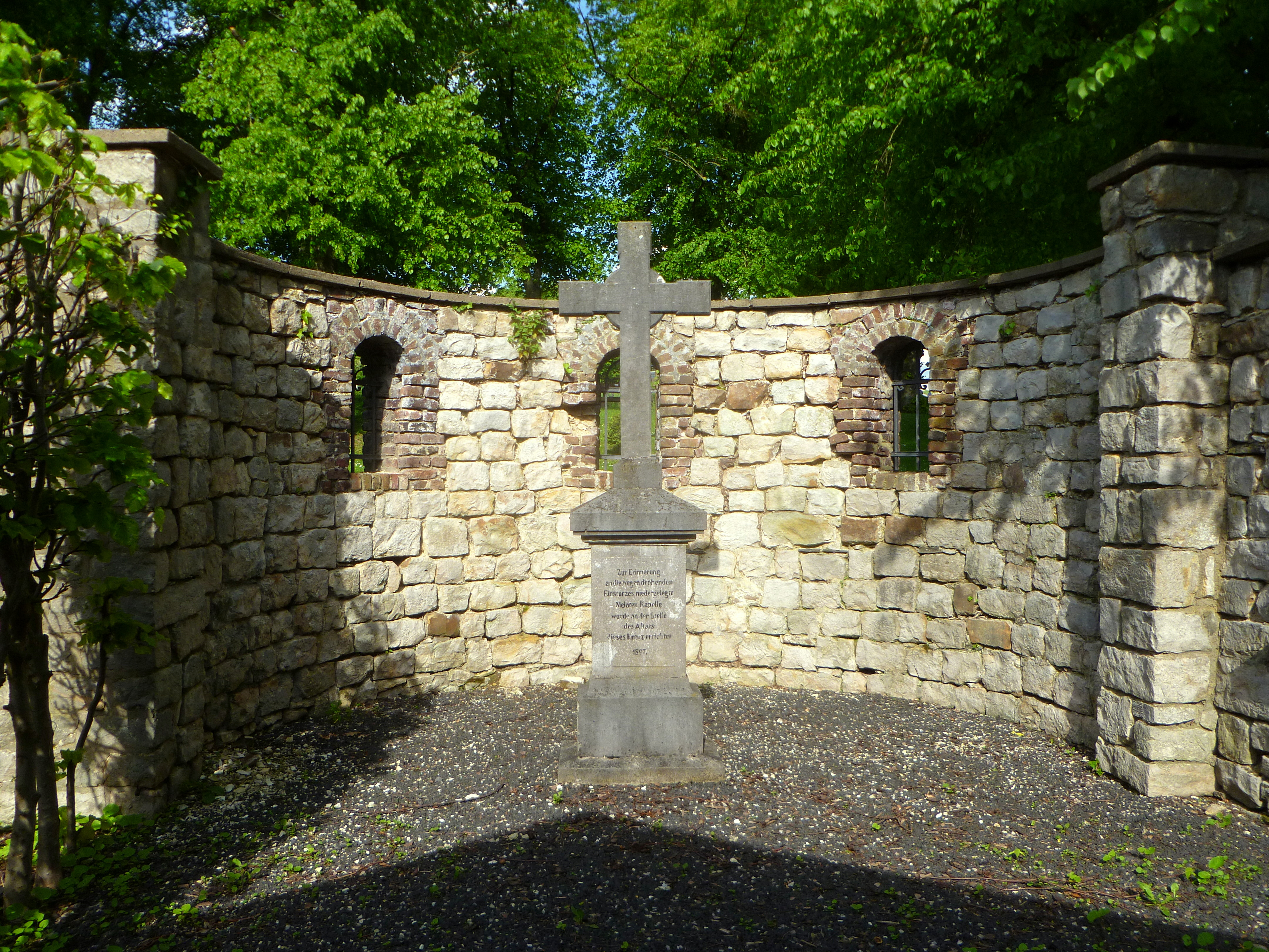 Ehemalige Kapelle an Gut Melaten mit "Altarkreuz". Inschrift: "Zur Erinnerung an die wegen drohenden Einsturzes niedergelegte Melaten-Kapelle wurde an der Stelle des Altars dieses Kreuz errichtet. 1897"